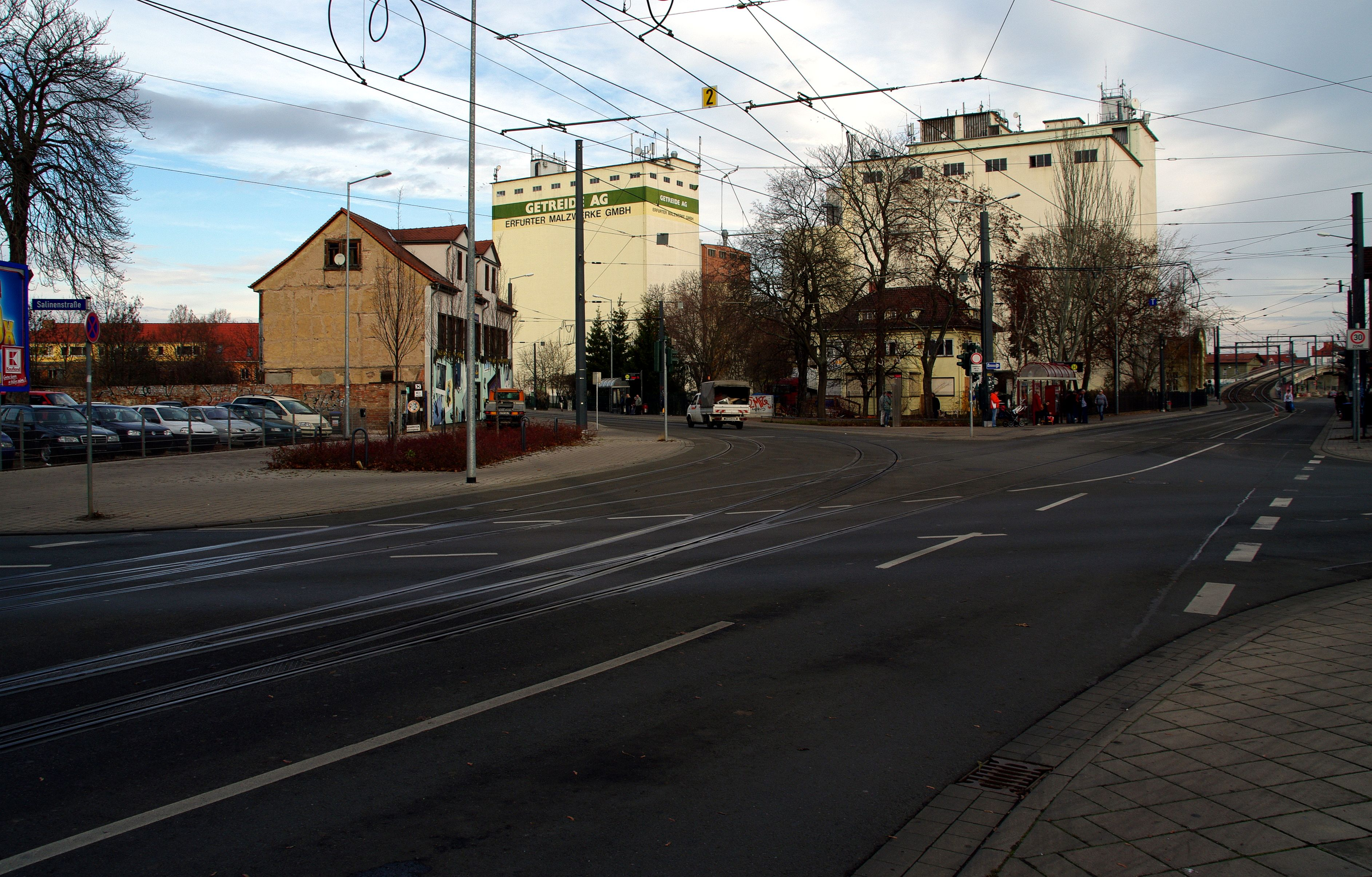 Die Kreuzung Magdeburger Allee, Vollbrachtstraße und Salinenstraße in Erfurt-Ilversgehofen.